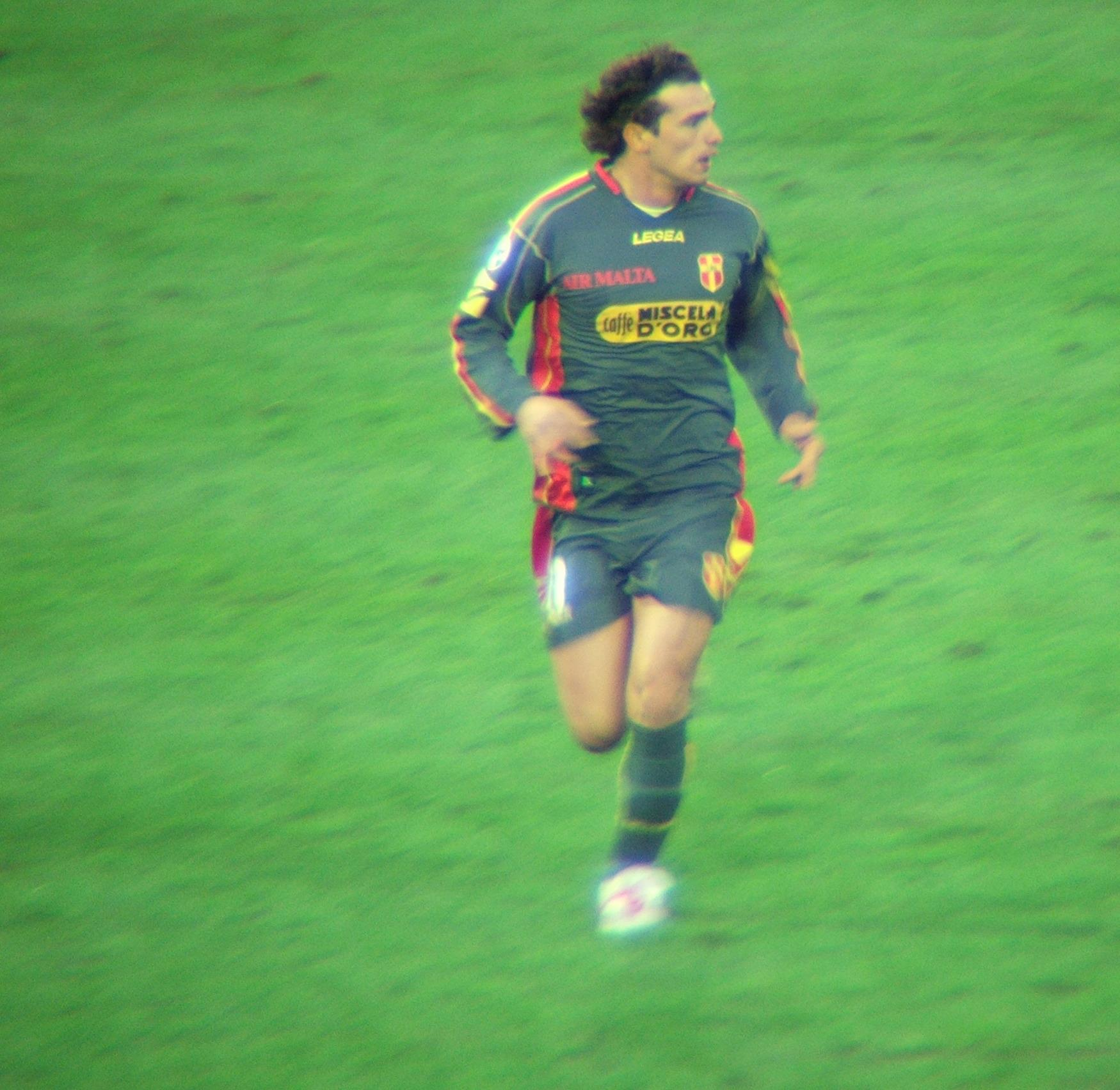 Di Napoli in Messina-Inter campionato 2005-2006 27-11-2005